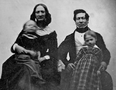 Familieportret van de Maastrichtse entrepreneur Thomas Regout (1805-1862), zijn vrouw Jeannette Ghijsen (1812-1894) en twee van hun zeven kinderen. Het is niet bekend welke kinderen op de foto staan afgebeeld. Aangezien er twee zonen waren, zijn er twee mogelijkheden. Indien de twee jongste kinderen zijn afgebeeld, geboren in 1847 en 1849, zou de foto dateren uit circa 1853-54; indien dit de twee oudsten zijn, geboren in 1837 en 1839, zou de foto tien jaar ouder zijn en daarmee een van de oudste van Nederland.